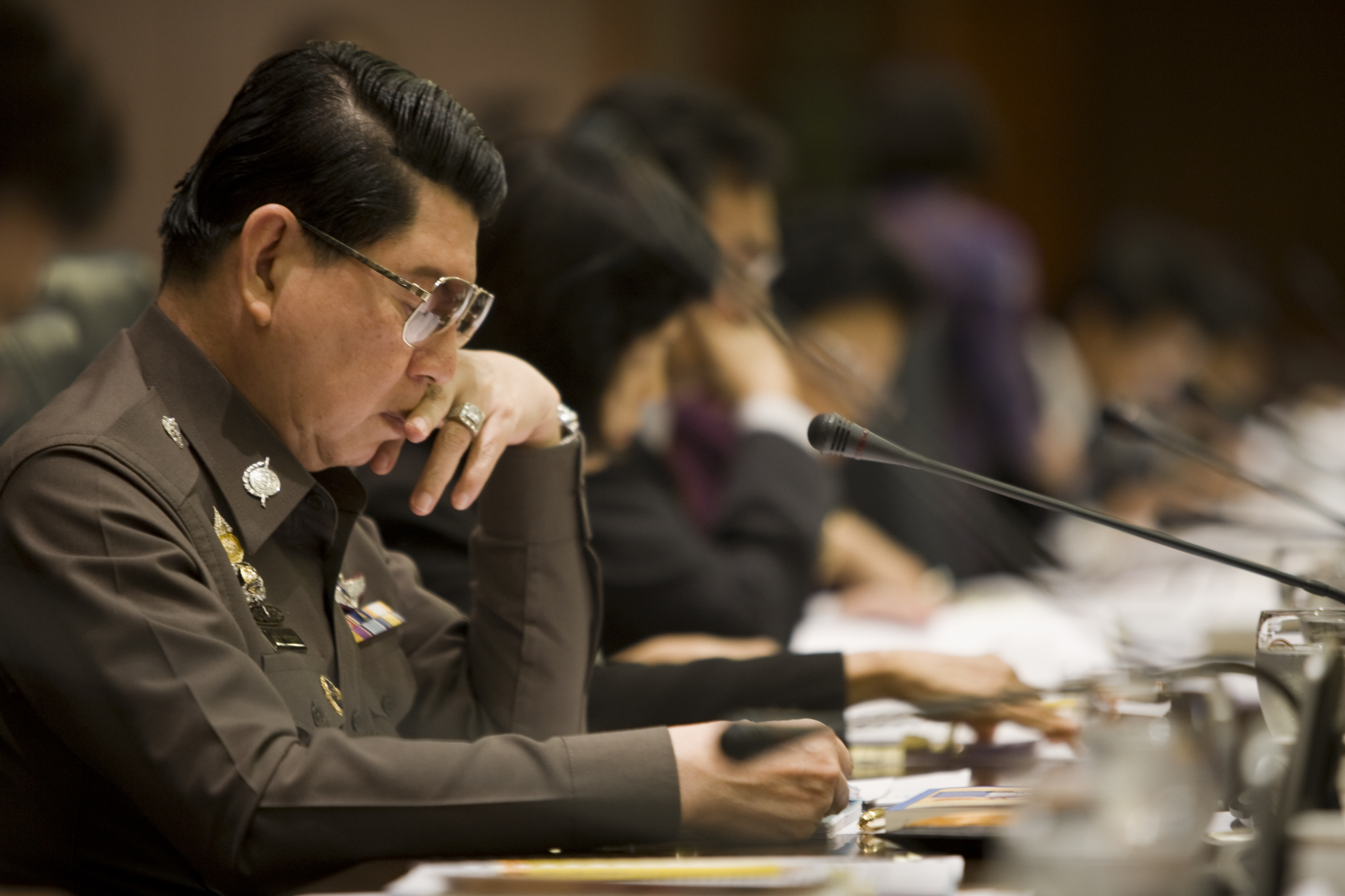 จงรัก จุฑานนท์ / การประชุมคณะกรรมการ สคบ. โดยรัฐมนตรีประจำสำนักนายกรัฐมนตรี สาทิตย์ วงศ์หนองเตย ณ ห้องประชุม ตึกบัญชาการ 1 ทำเนียบรัฐบาล วันที่ 15 กรกฏาคม 2552(The Royal Thai Government Photo by พีรพัฒน์ วิมลรังครัตน์)